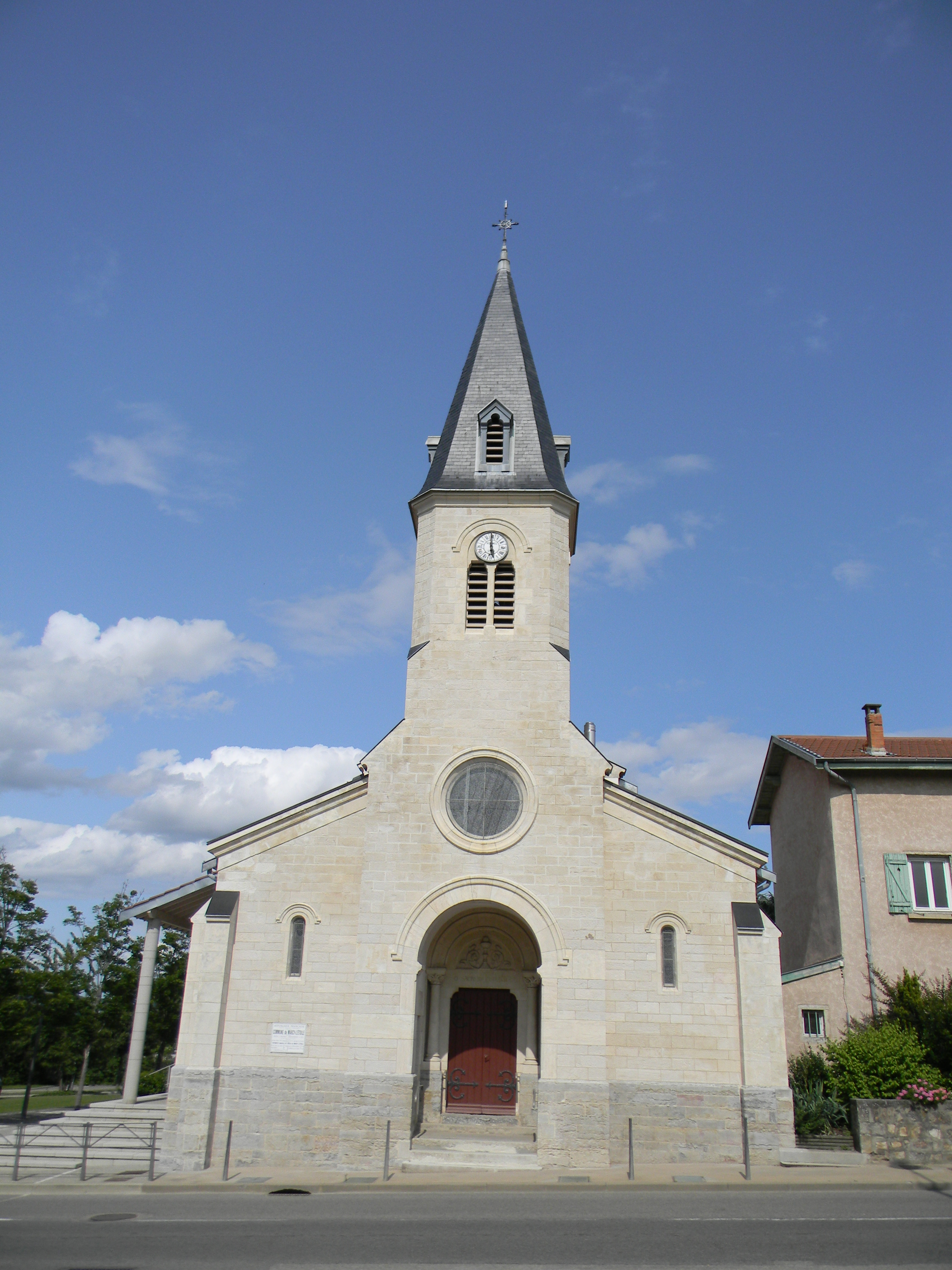 Église de Marcy-l'Étoile.